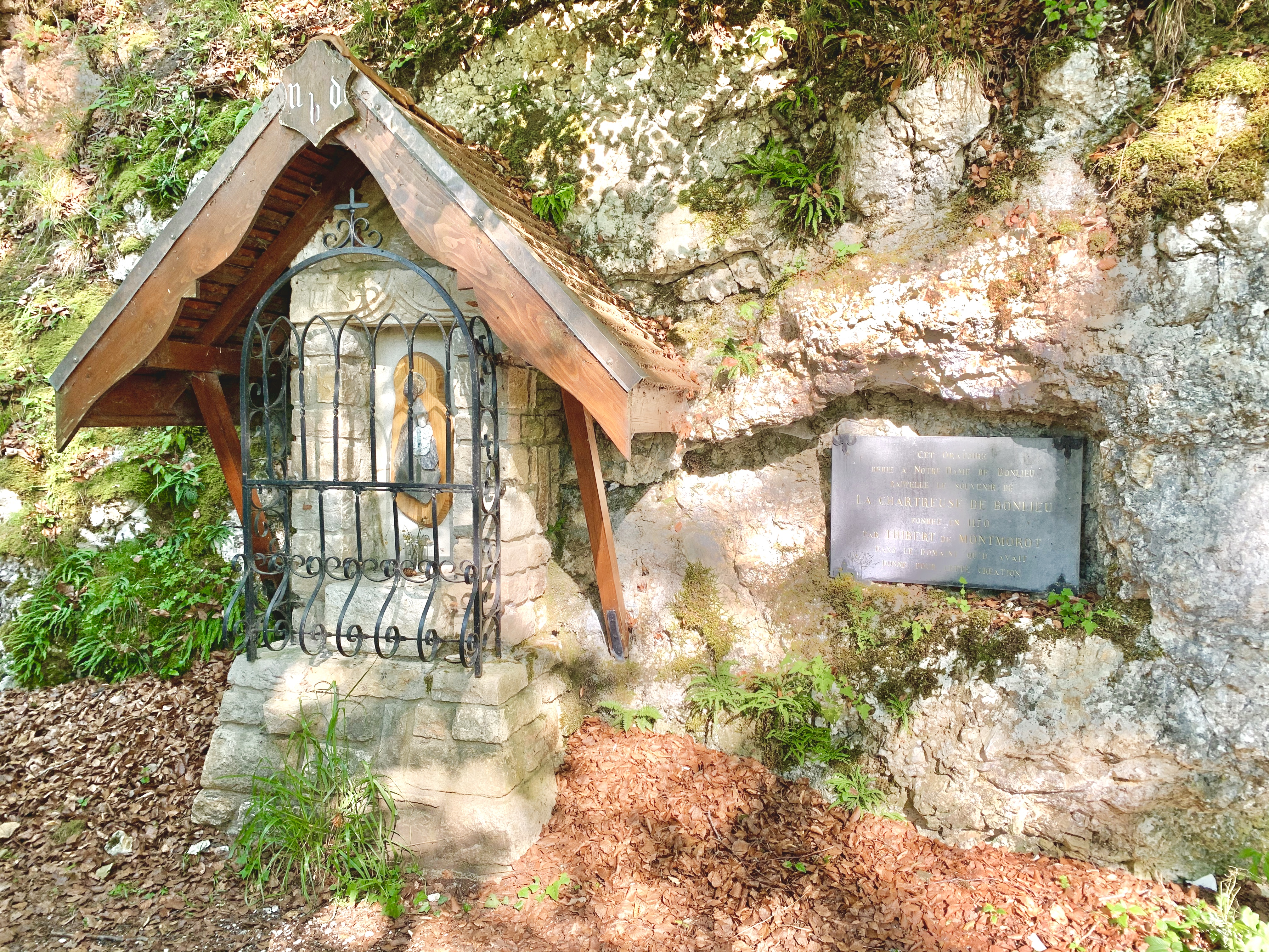 Cet oratoire est dédié à Notre Dame de Bonlieu rappelle le souvenir de la Chartreuse de Bonlieu fondée en 1170 par Thibert de Montmorot dans le domaine qu’il avait donné pour cette création.